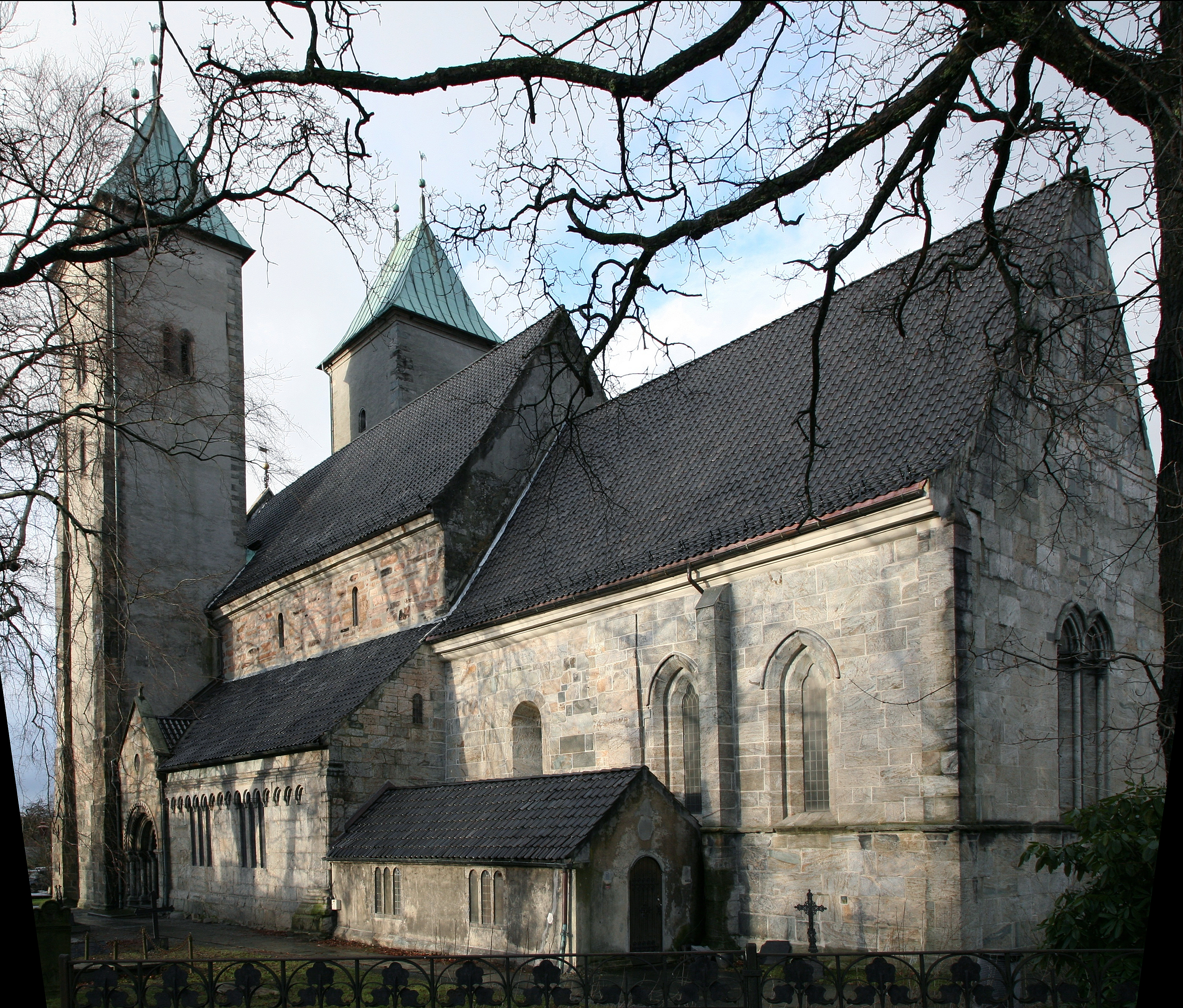 Mariakirken i Bergen